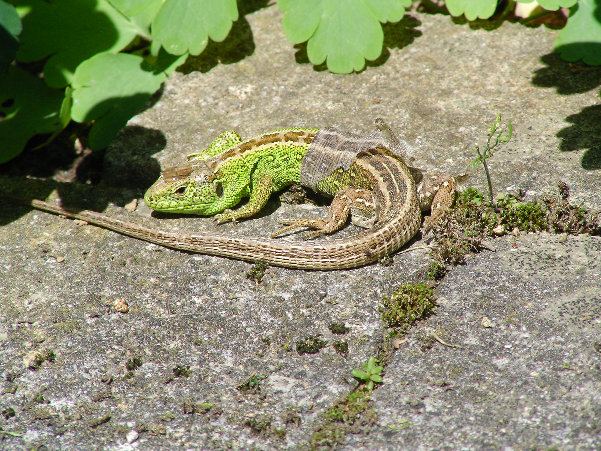 Eidechse während der Häutung mit Tautropfen auf dem Kopf